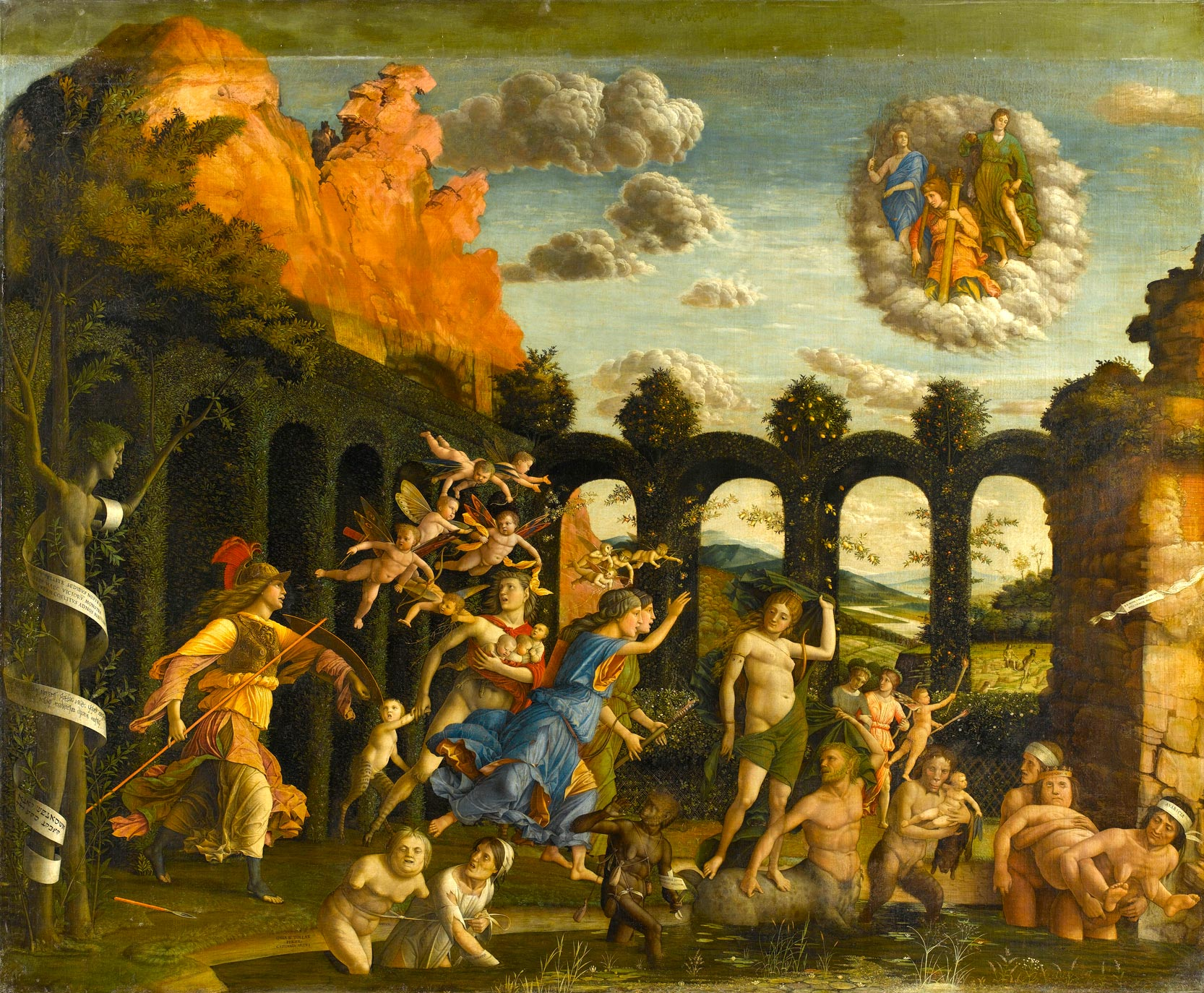 Minerve chassant les vices du jardin de la vertutitle QS:P1476,fr:"Minerve chassant les vices du jardin de la vertu" label QS:Lfr,"Minerve chassant les vices du jardin de la vertu"